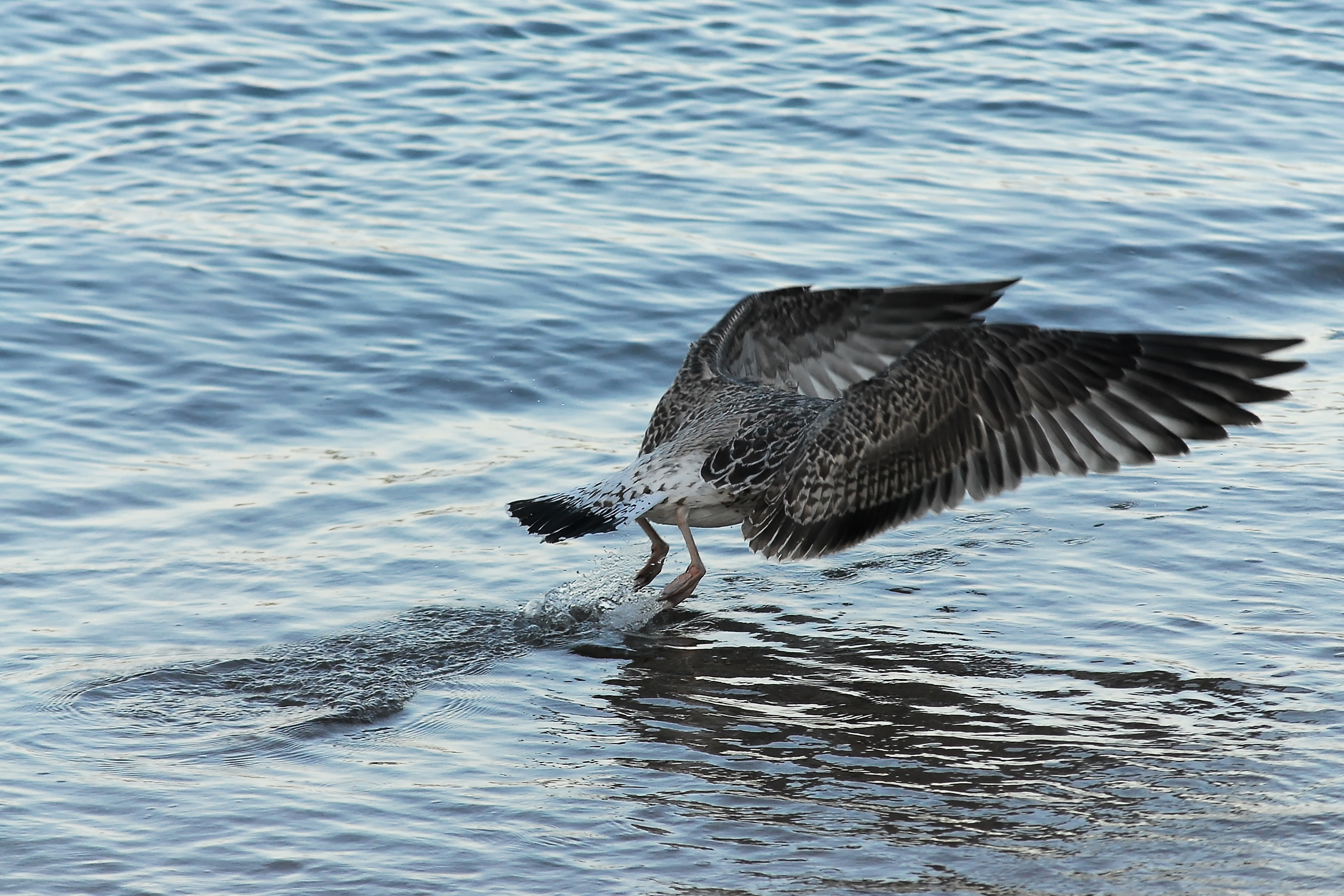 SAINT-RAPHAEL: L'envol d'un goéland Larus fuscus.